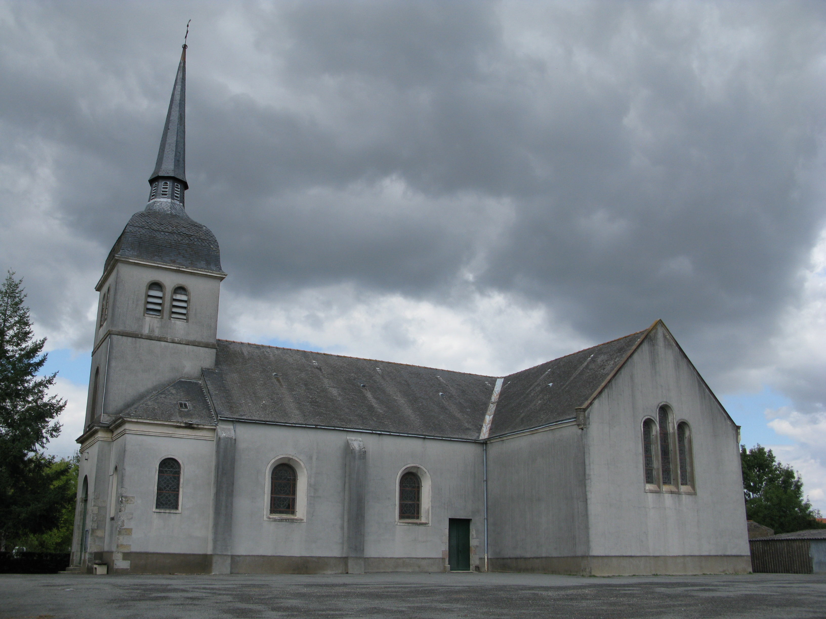 L'église de Touvois